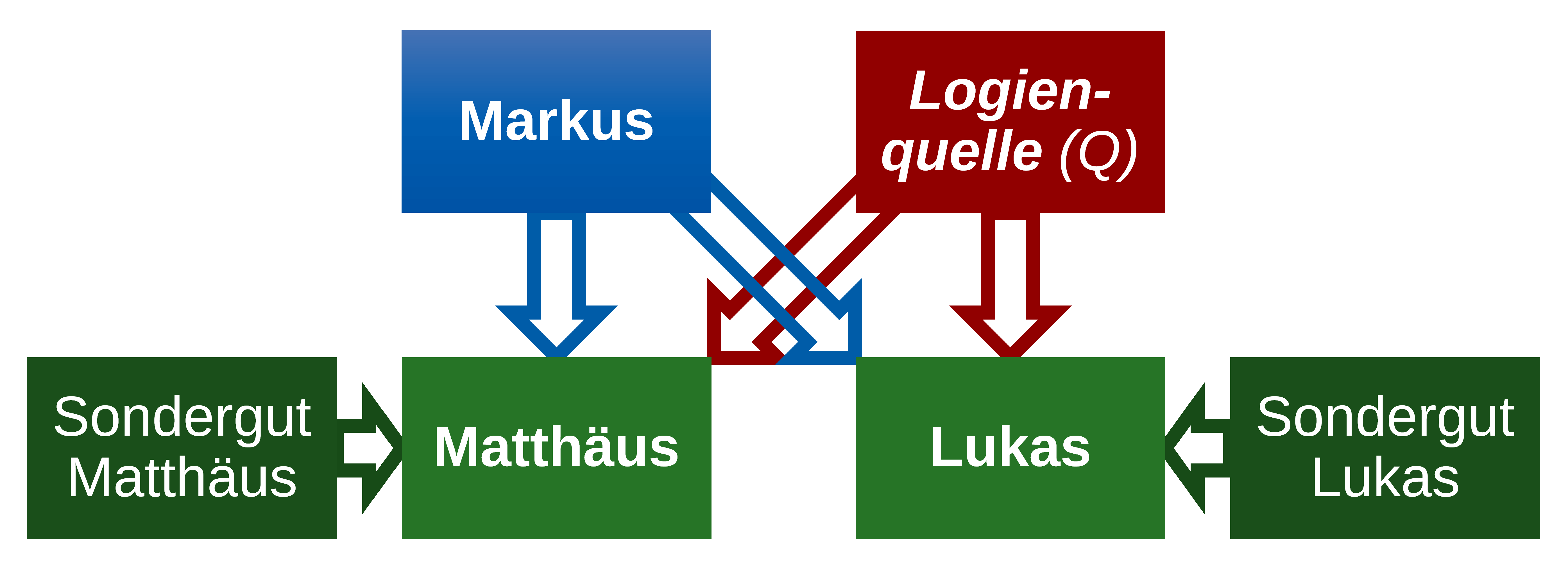 grafische Veranschaulichung der Zweiquellentheorie zu den Zusammenhängen der Entstehung der Evangelien von Markus, Matthäus, Lukas